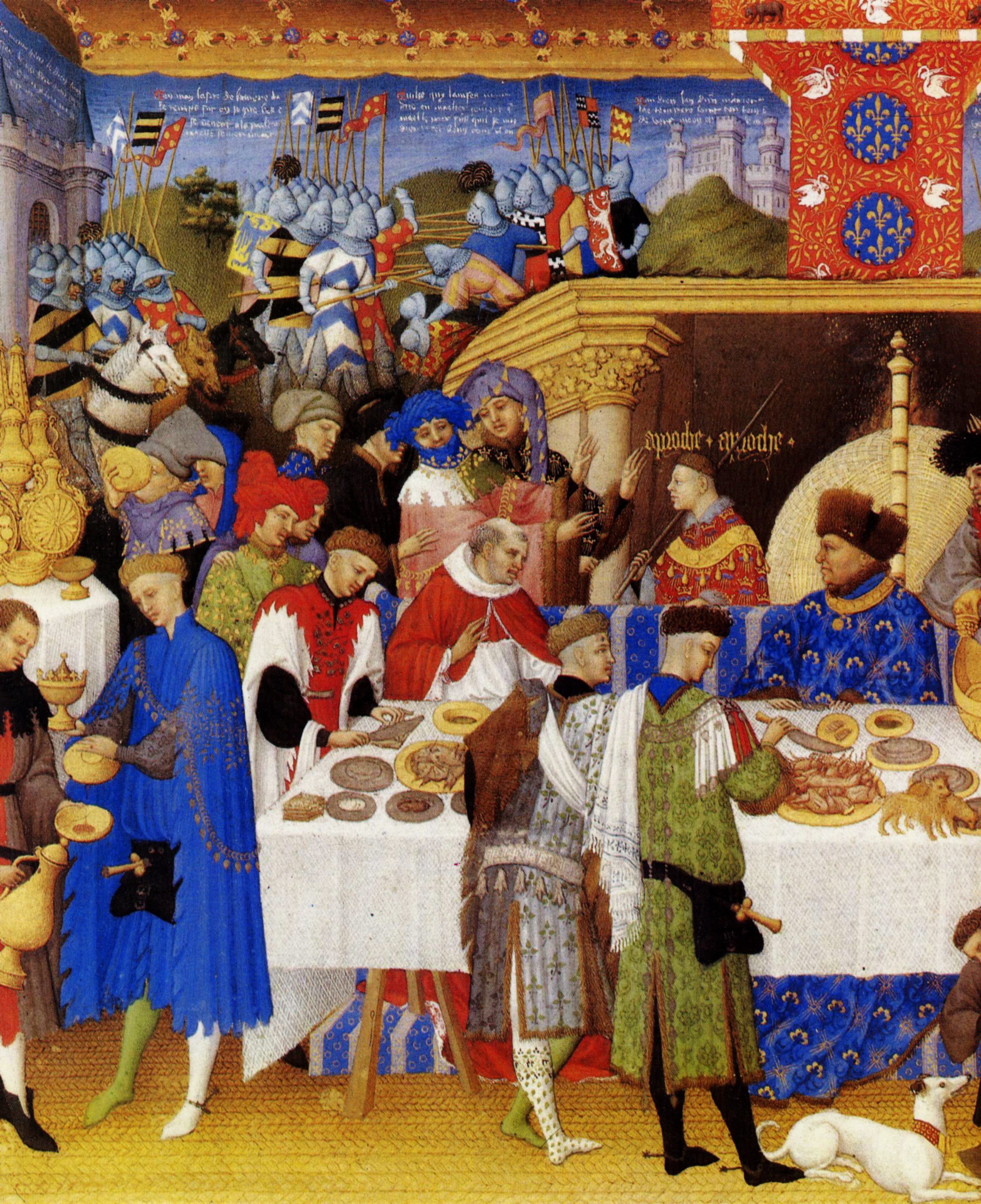 Le duc de Berry, assis en bas à droite, dos au feu, est habillé de bleu et coiffé d'un bonnet de fourrure. Il invite ses gens et ses proches à se présenter à lui. Derrière lui figure l'inscription « Approche Approche ». Plusieurs familiers du duc s'approchent de lui pendant que des serviteurs s'affairent : les échansons servent à boire, deux écuyers tranchants au centre sont vus de dos ; au bout de la table officie un panetier. Au-dessus de la cheminée figurent les armes du duc, « d'azur semé de fleurs de lys d'or, à la bordure engrêlée de gueules », avec de petits ours et des cygnes blessés. Plusieurs animaux de compagnie sont représentés : petits chiens sur la table, lévrier au sol. La tapisserie du fond de la salle semble représenter des épisodes de la guerre de Troie